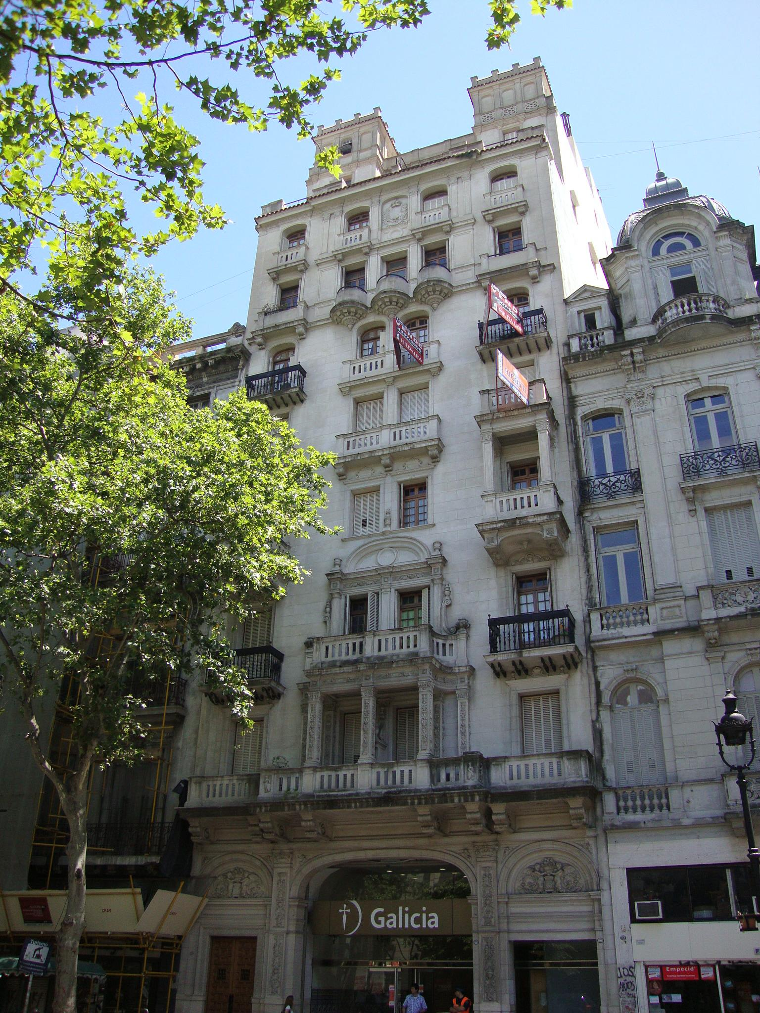 Edificio de la Avenida de Mayo nº 1229. Año 1925.